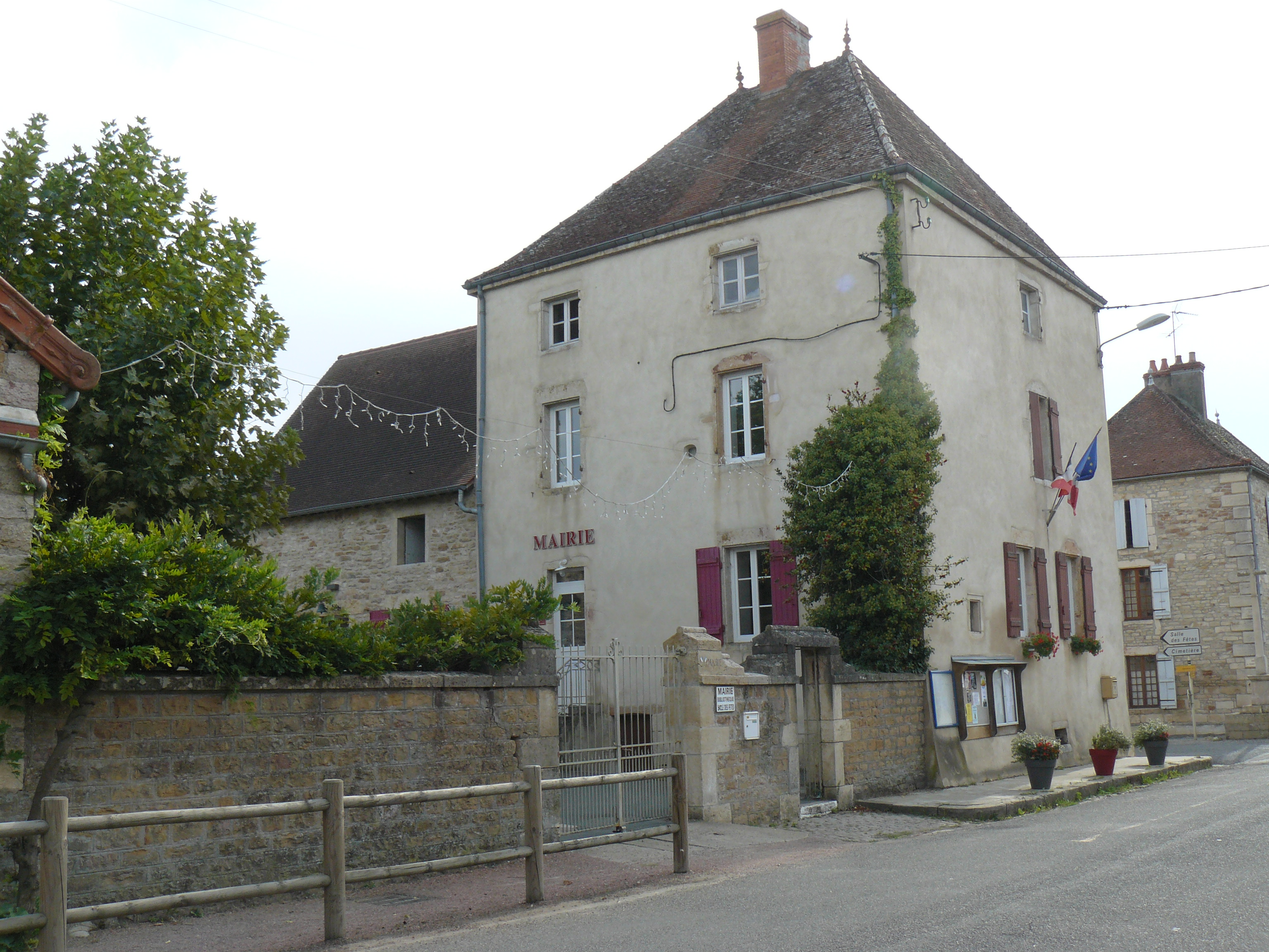 Bâtiment de la Mairie de Lalheue (Saône-et-Loire)